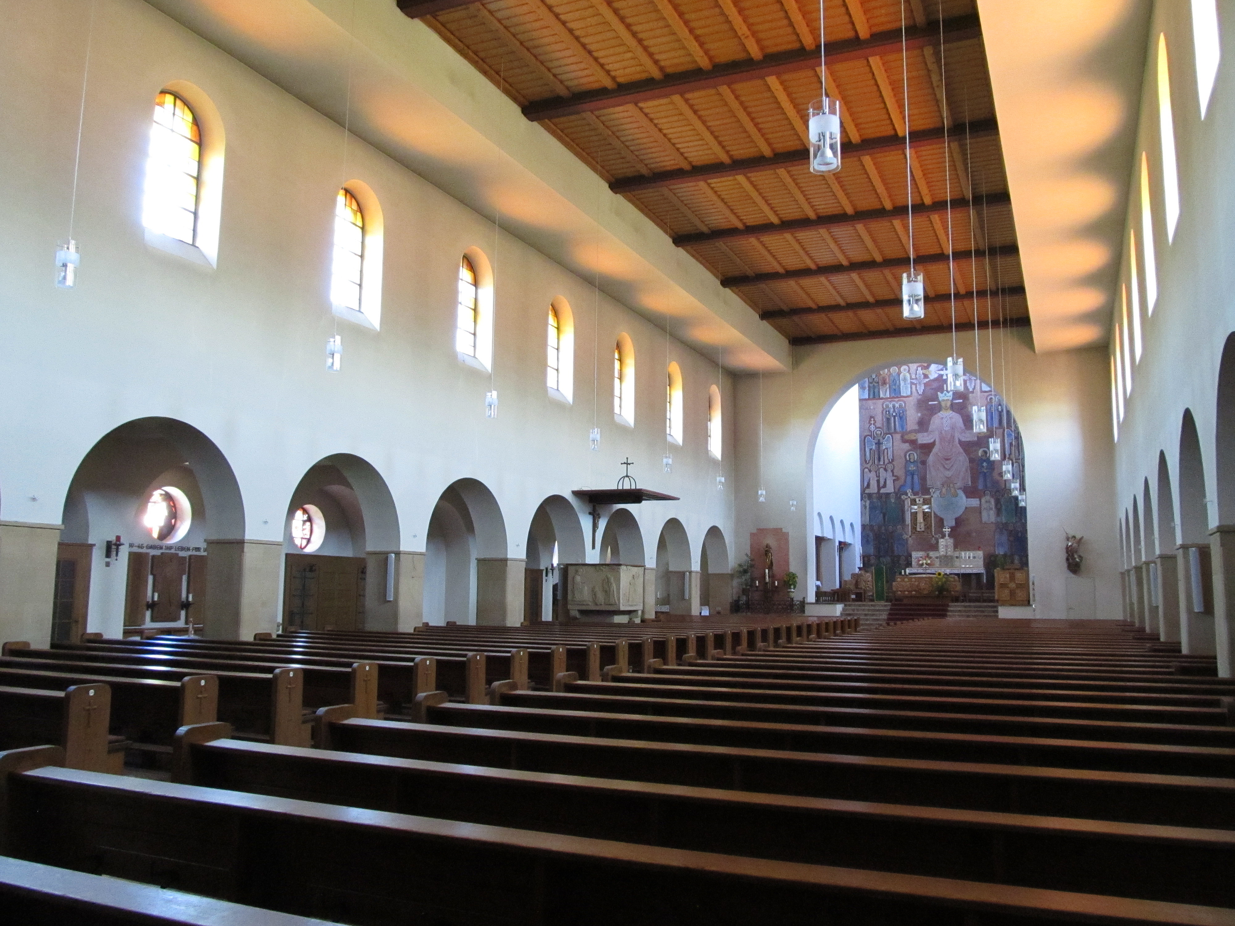 Blick ins Innere der katholischen Pfarrkirche Christkönig in Hauenstein, Kreis Südwestpfalz, Rheinland-Pfalz